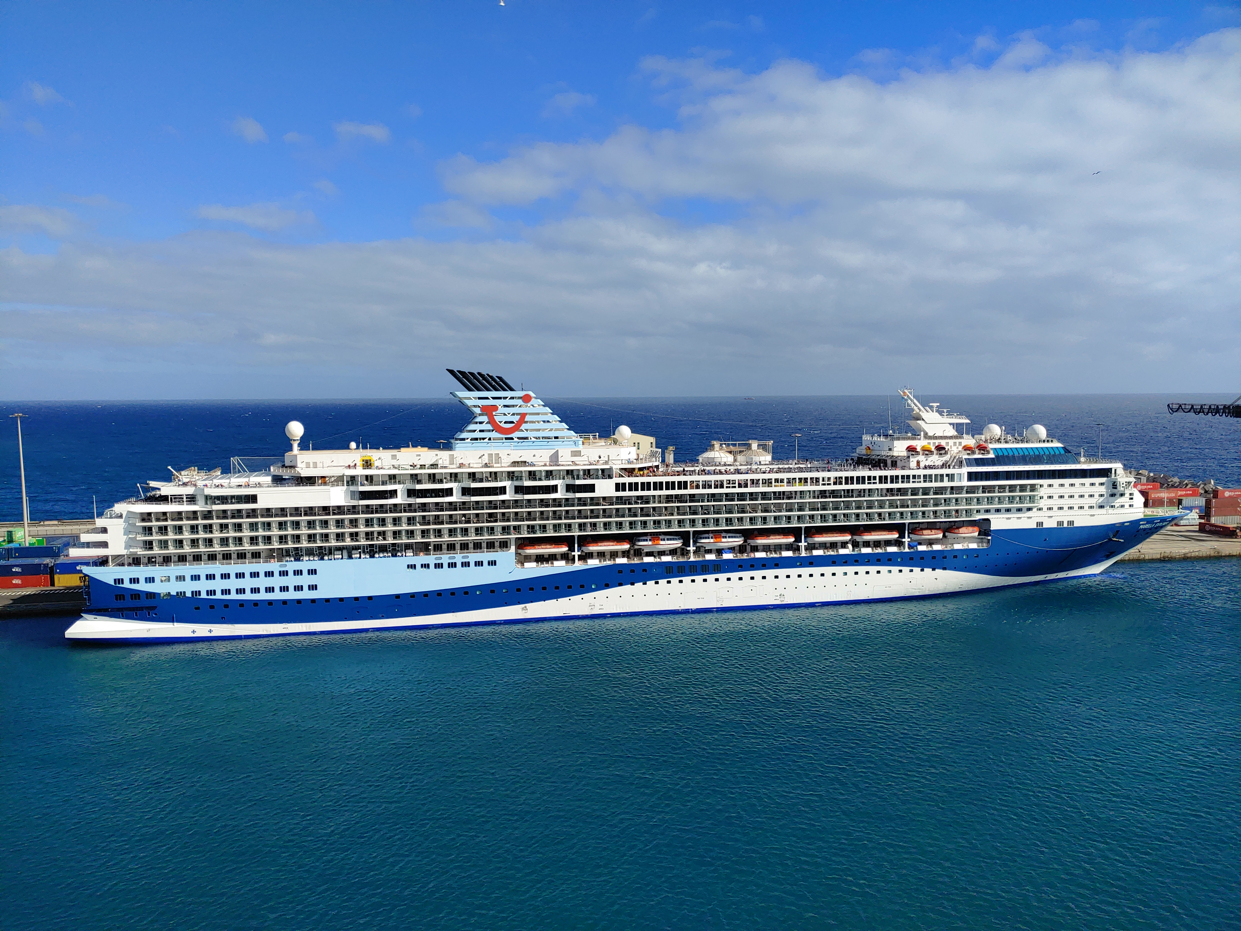 Marella Explorer auf Fuerteventura in Puerto del Rosario (am Hafen Muelle de Cruceros), 12. Dezember 2019.